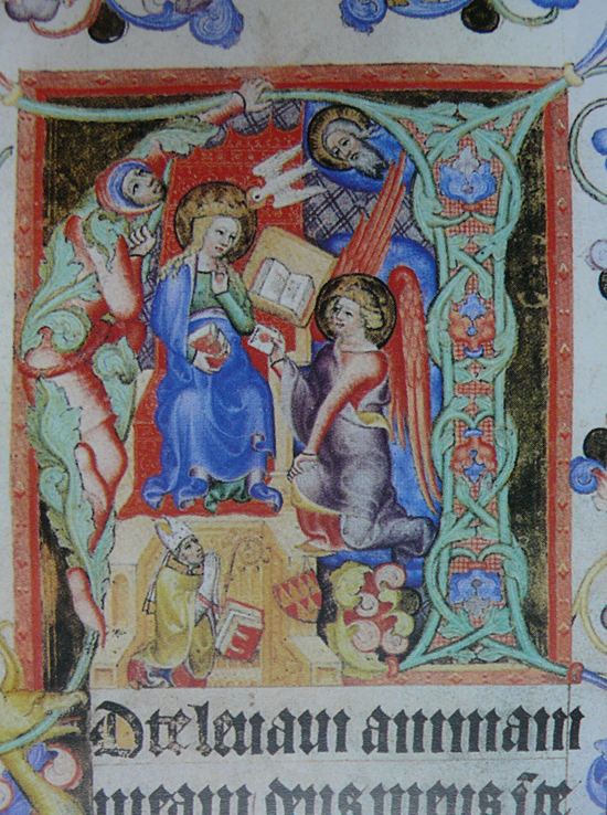 Zvěstování - iniciála A z Misálu Jana ze Středy